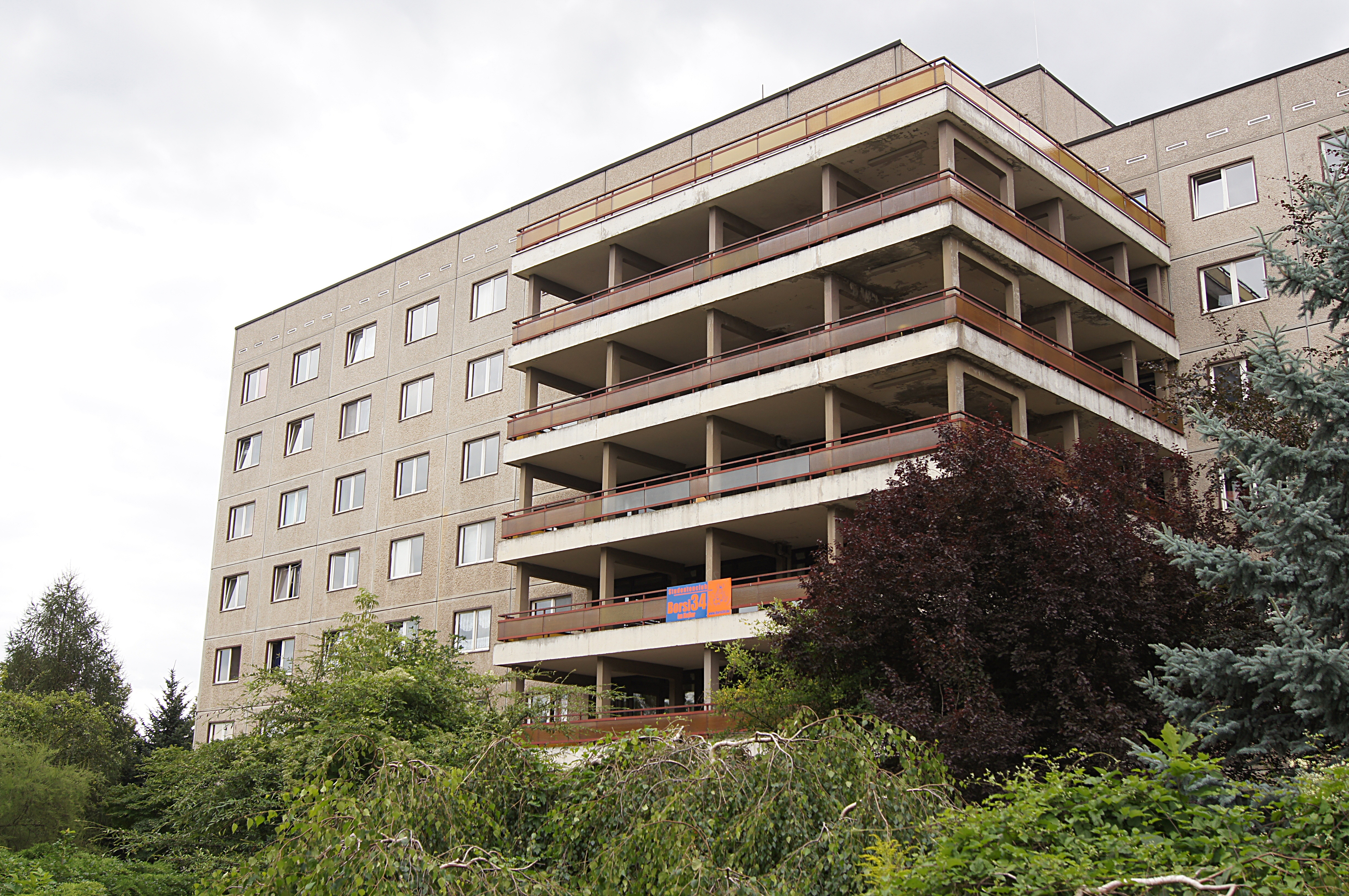 Dresden. Studentenwohnheim Borsbergstraße 34.